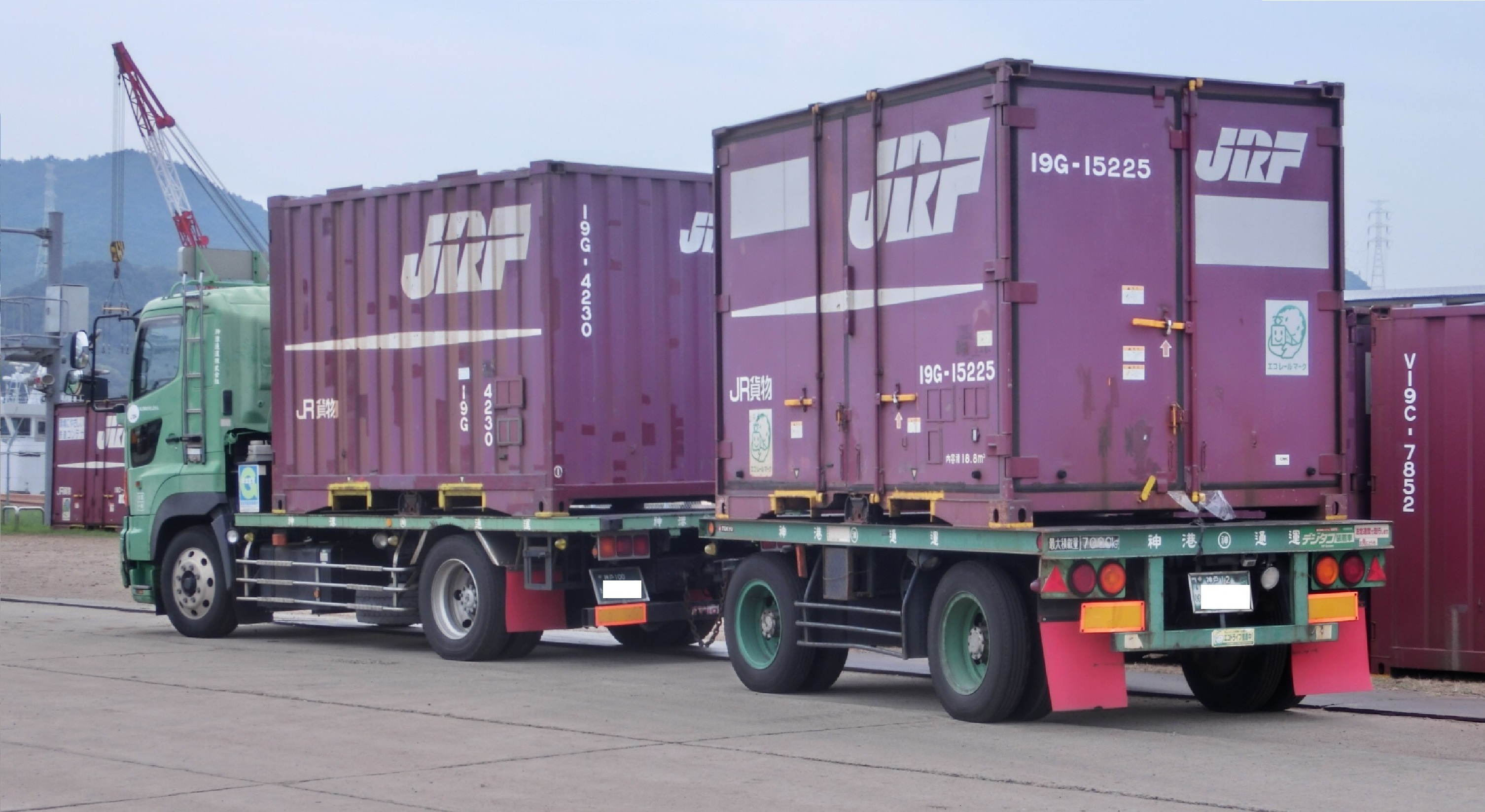 三度目の移転で広大な敷地と、完全に隔離され夜間留置の安全性が高まった岡山市東区にある 「 岡山新港高島埠頭 」 で、JR貨物所有の12ft形コンテナを船舶代行輸送する風景。 停泊している内航船で、北九州港へ一日一往復していた。 内航船の横に設置されたクレーン車で吊り作業を行い、コンテナの敷地内の移動は、二台の10t級フォークリフトで行う。 ＝＝＝＝＝＝＝＝【 総 括 】＝＝＝＝＝＝＝＝ 2018年 ( 平成30年 ) 7月5日 ( 木 ) から岡山県や広島県及び、山口県内の各地で発生した 「 平成３０年７月豪雨 」 の影響により、三県内の山陽本線で複数個所において、線路喪失を含む大規模な輸送障害が三ヶ月以上にわたり発生した。 これに伴い、元々岡山県内の拠点となっている 「 JR貨物岡山(タ) 」 が今回の輸送障害区間では、事実上の東側の終着点駅となり、この影響で福山通運の30ftコンテナのみを一列車貸切っている 「 福山レールエクスプレス号 」 積載の全コンテナを始め、全国からの九州地区向けの大口宅配や冷凍などで大量に扱われていた20ft及び、30ftの大型コンテナを全て 「 岡山(タ) 」 で臨時に取り扱うこととなった。 「 岡山(タ) 」 ではこれらの大型コンテナを最優先輸送させる為に、広島や山口へのトラック代行輸送する臨時便が一気に集中し、荷役能力の逼迫となってしまった。 また岡山県内の水島臨海鉄道の拠点コンテナ駅である 「 東水島駅 」 への関東からの定期列車は、本来はこの 「 岡山(タ) 」 で一部のコンテナの取り卸と、機関車を付け替えてから 「 東水島駅 」 へ中継輸送していたので、この関東便に関してはさほど問題は無かったが、 通常の 「 東水島駅 」 から 「 岡山(タ) 」 で中継して九州向けのルートが絶たれてしまった。 この打開策として、 「 東水島駅 」 ～ 九州向けの入出荷ルートと、近隣の 「 姫路貨物駅 」 や 「 神戸(タ) 」 での置き去り気味で滞留し続ける12ft形5tコンテナ （ 私有コンテナを除く ） の輸送を確保するために、船舶を利用した 「 災害時の鉄道代行輸送 」 ルートとして、中国地区としては初めてとなる福岡県 「 北九州港 」 までの船舶輸送が始まった。 担当港は、「 東水島駅 」 の最寄港となる 「 水島港 」 を利用すれば一番効率もよく、また駅から港までの輸送費も抑えられるが、当初予想されていた約四ヶ月もの期間を一貫して使用できる用地の確保する見通しがたたず、緊急暫定的処置として、初日の7月18日 ～ 約一週間程度の短期間を、地元の水島港 （ 実地港区は不明 ） で取り扱うこととなった。 7月下旬からは、荷役埠頭敷地や荷役設備の受け入れ準備が整った、東水島駅から陸路で約30キロ離れた岡山市南区の 「 岡山港福島埠頭 (ゲートも無く出入り自由地区) 」 で、8月31日までの期限付きで着地港の変更無く 「 水島港 」 から引き継がれてた。 更に9月1日からは、積み残しや陸路の輸送待ちで安全に夜間でも留置できる設備の確保として、荷役埠頭がフェンスで完全に区画管理されて専用使用できる、陸路で約三キロ離れた河口対岸の岡山市東区にある 「 岡山新港高島埠頭 」 へ、再度移転して一連の代行輸送が最終日となる、9月28日の下り便の出航まで続いていた。